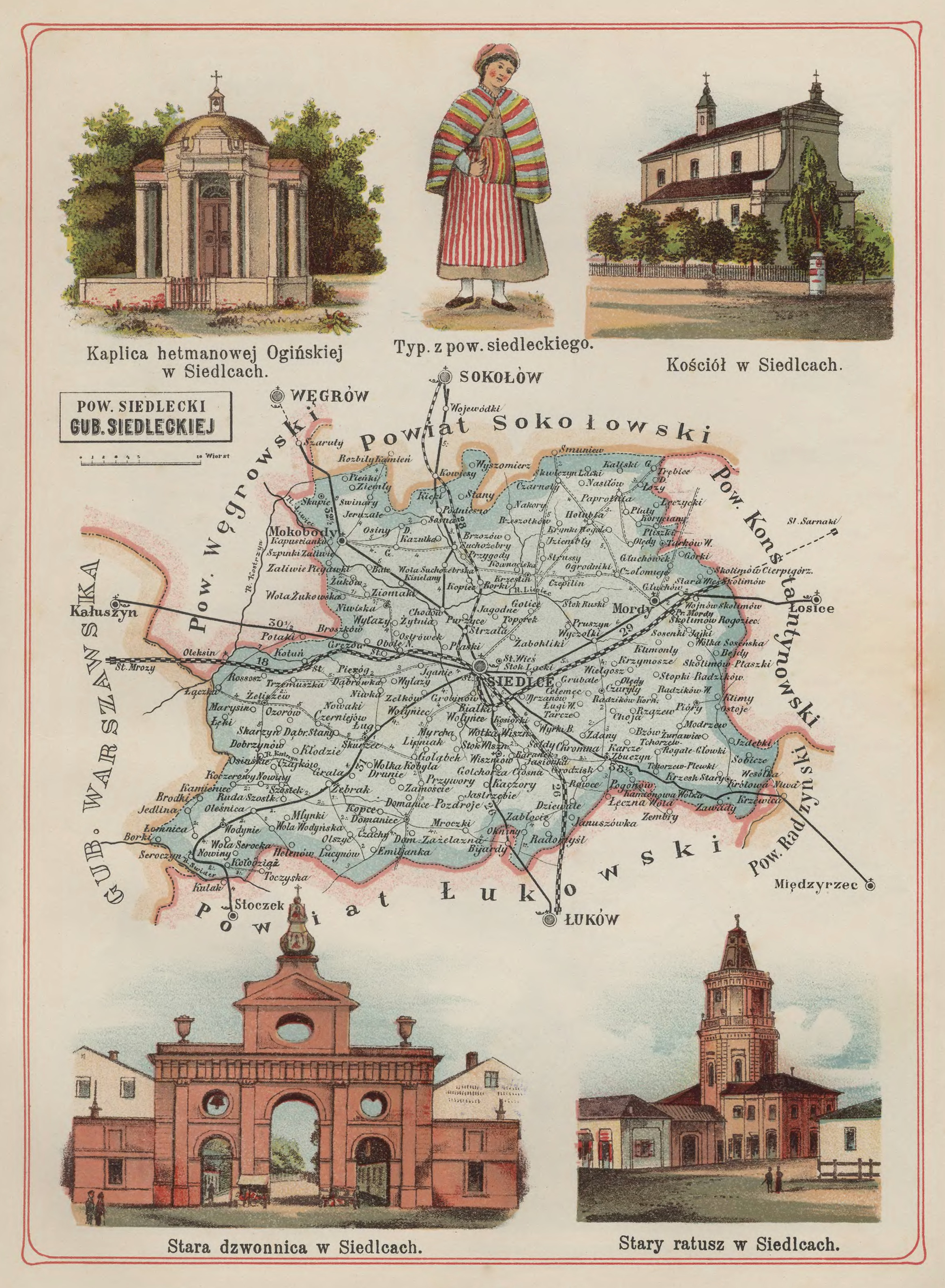 Józef Michał Bazewicz - "Atlas geograficzny ilustrowany Królestwa Polskiego": powiat siedlecki w guberni siedleckiej